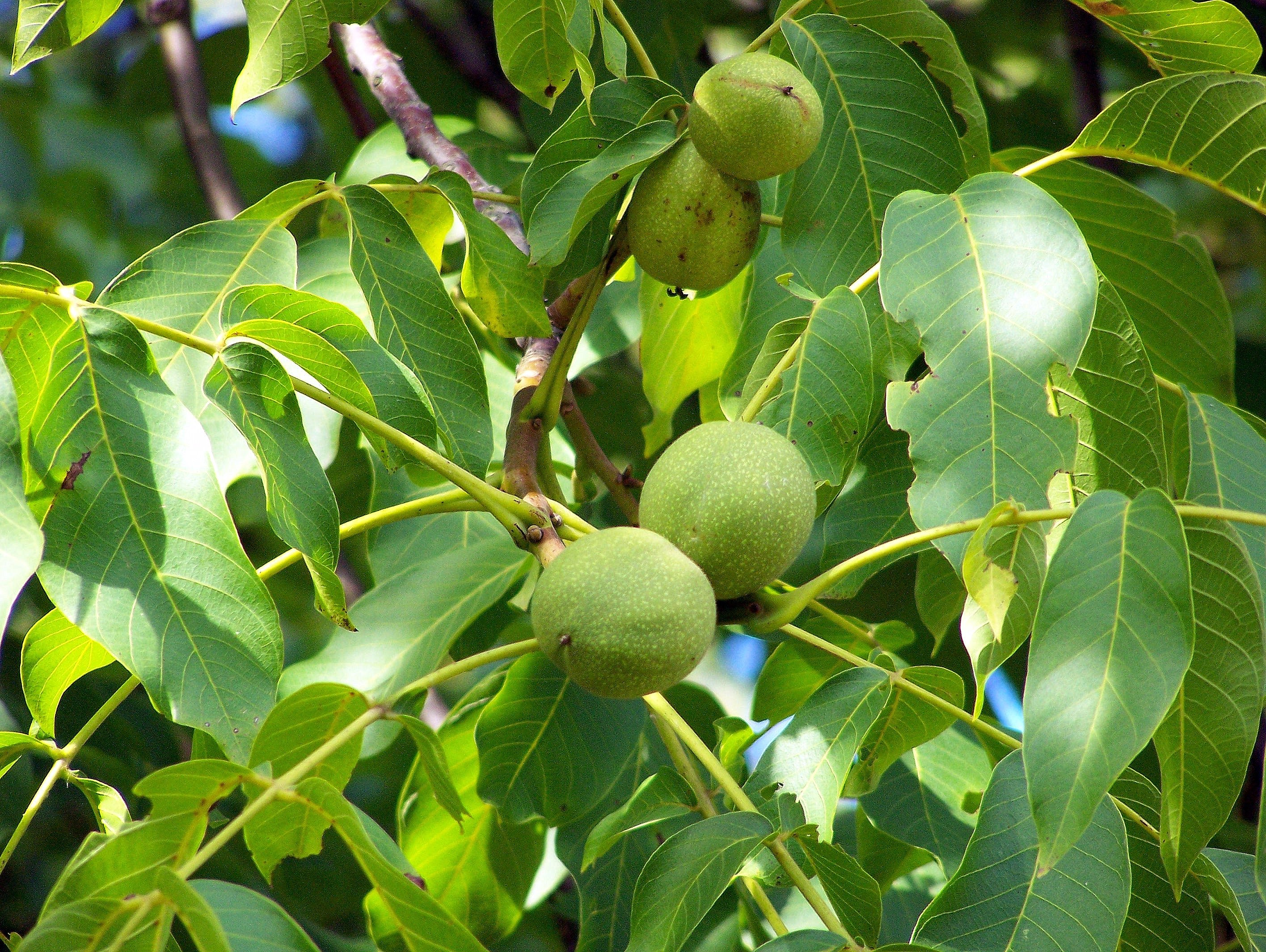 Juglans regia (Christnuss, Echte Walnuss, English walnut, Noce, Nogal, Noyer commun, Okkernoot, Steinnuss, Walnussbaum, Walnut, Welschnussbaum)